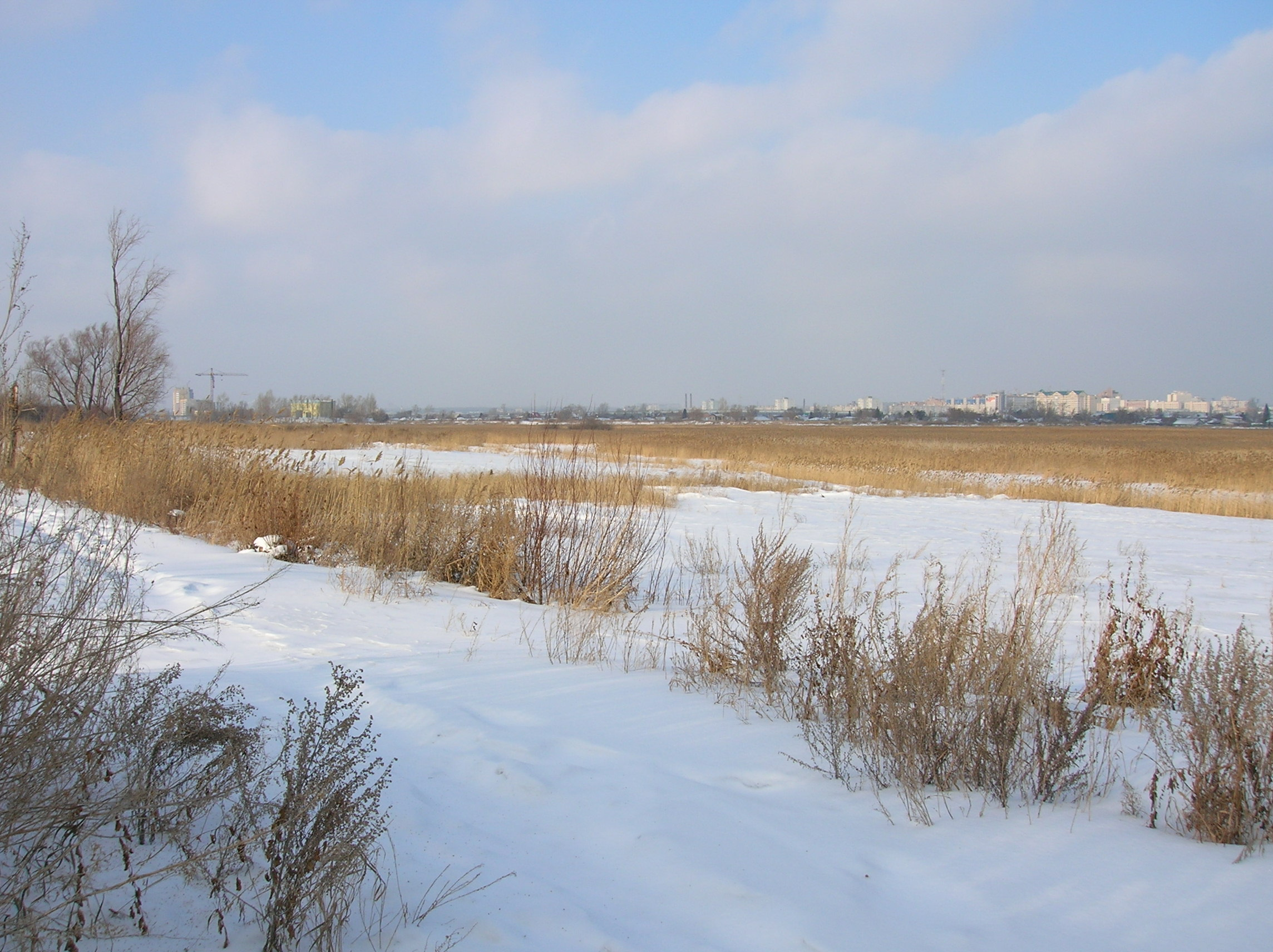 Природный парк «Птичья гавань» зимой.